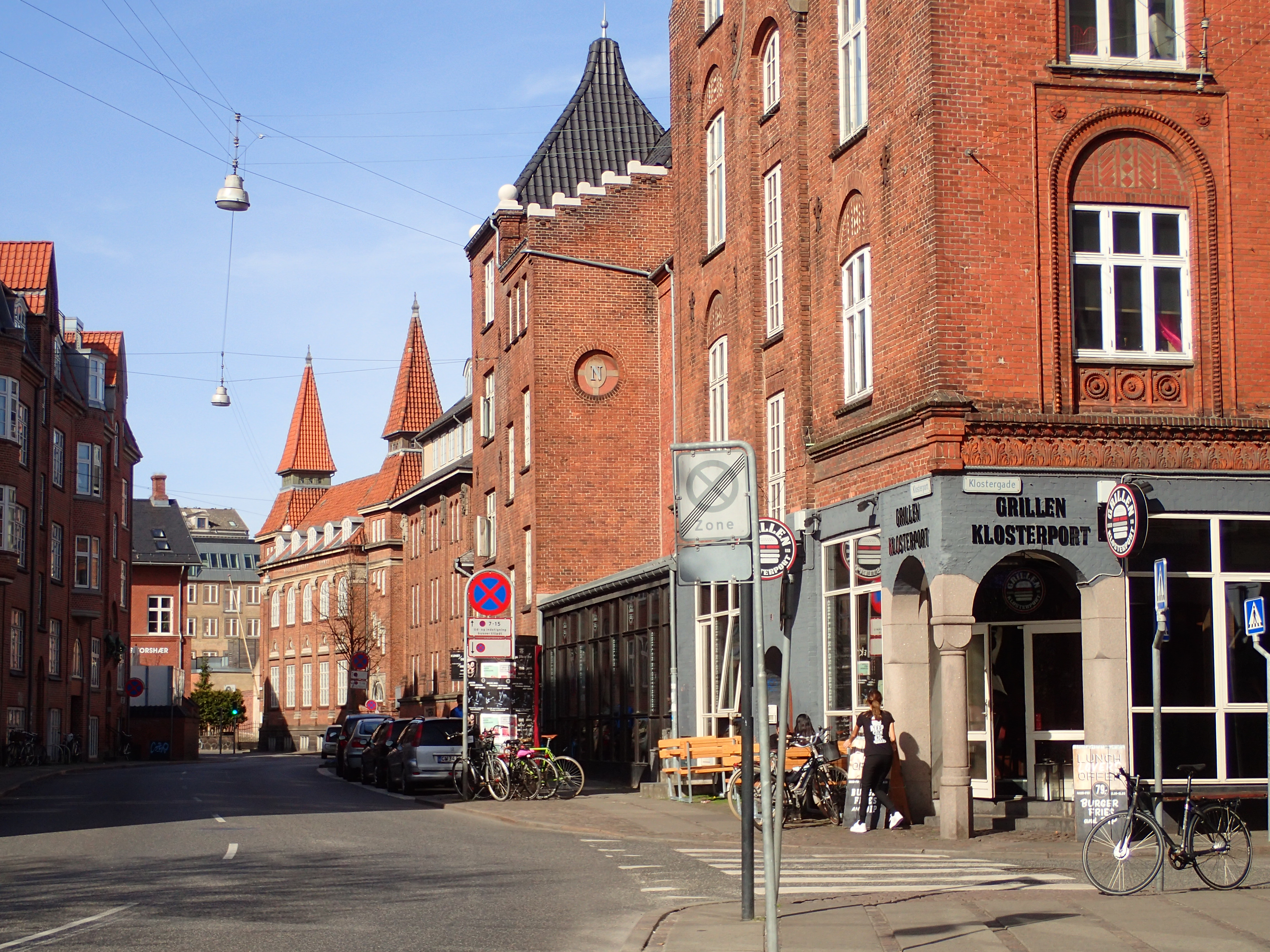 Klosterport